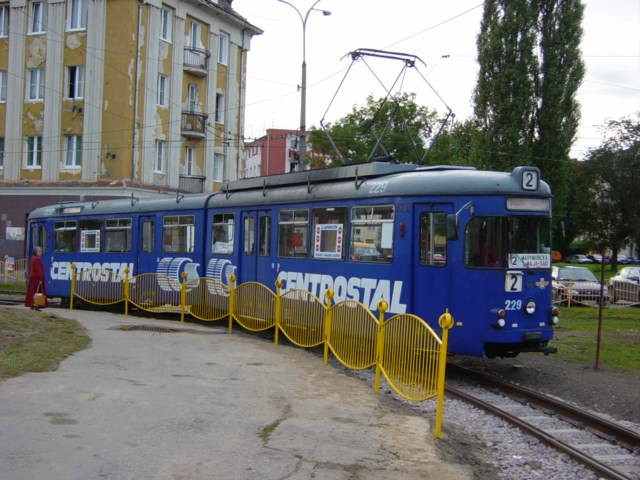 Tramwaj GT6 na ulicy 3 Maja w Elblągu. Tram GT6 on 3rd May Street in Elbląg, Poland.